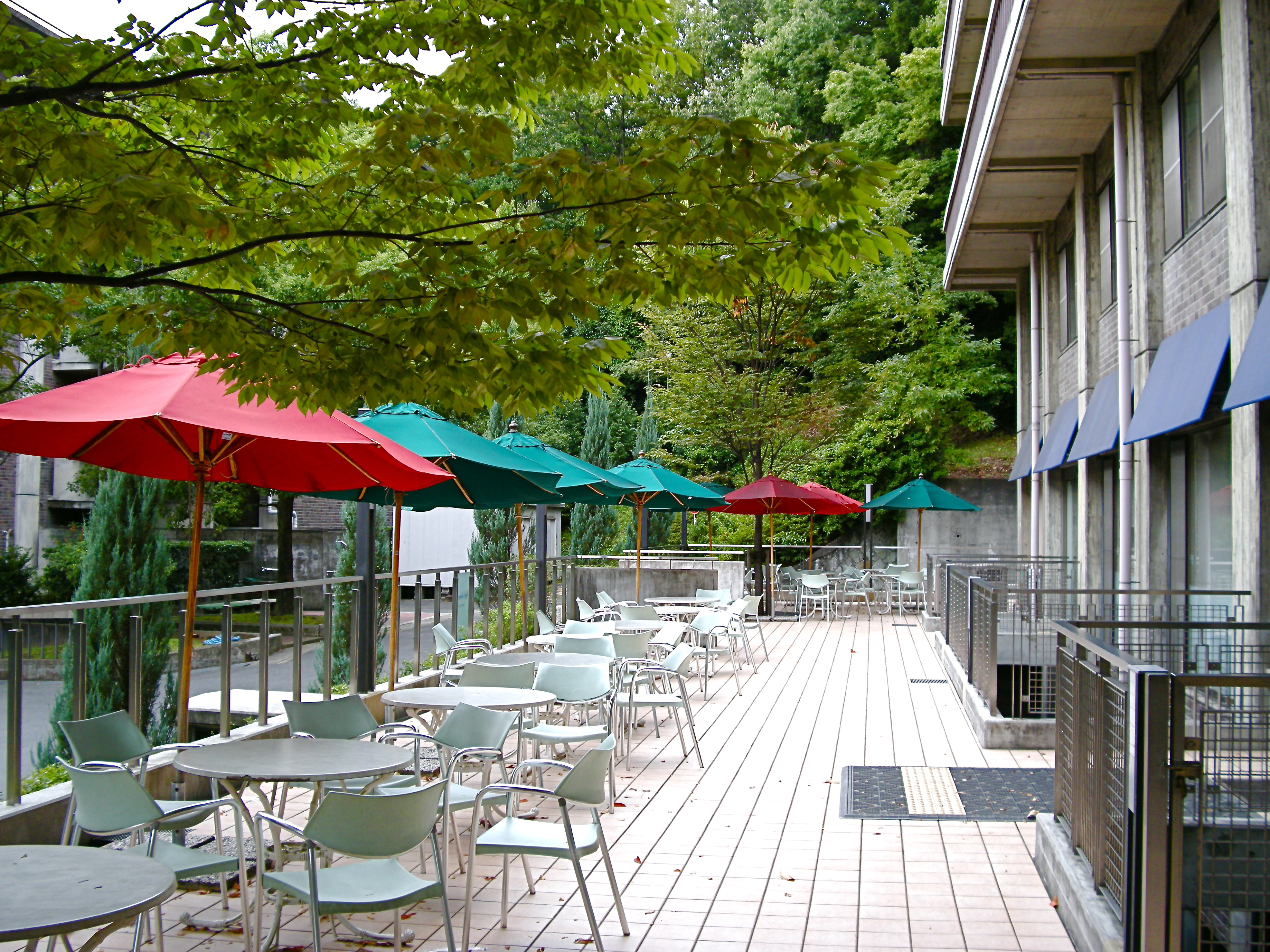 Cafe Junge (Kinugasa Campus, Ritsumeikan University, Kyoto, Japan)